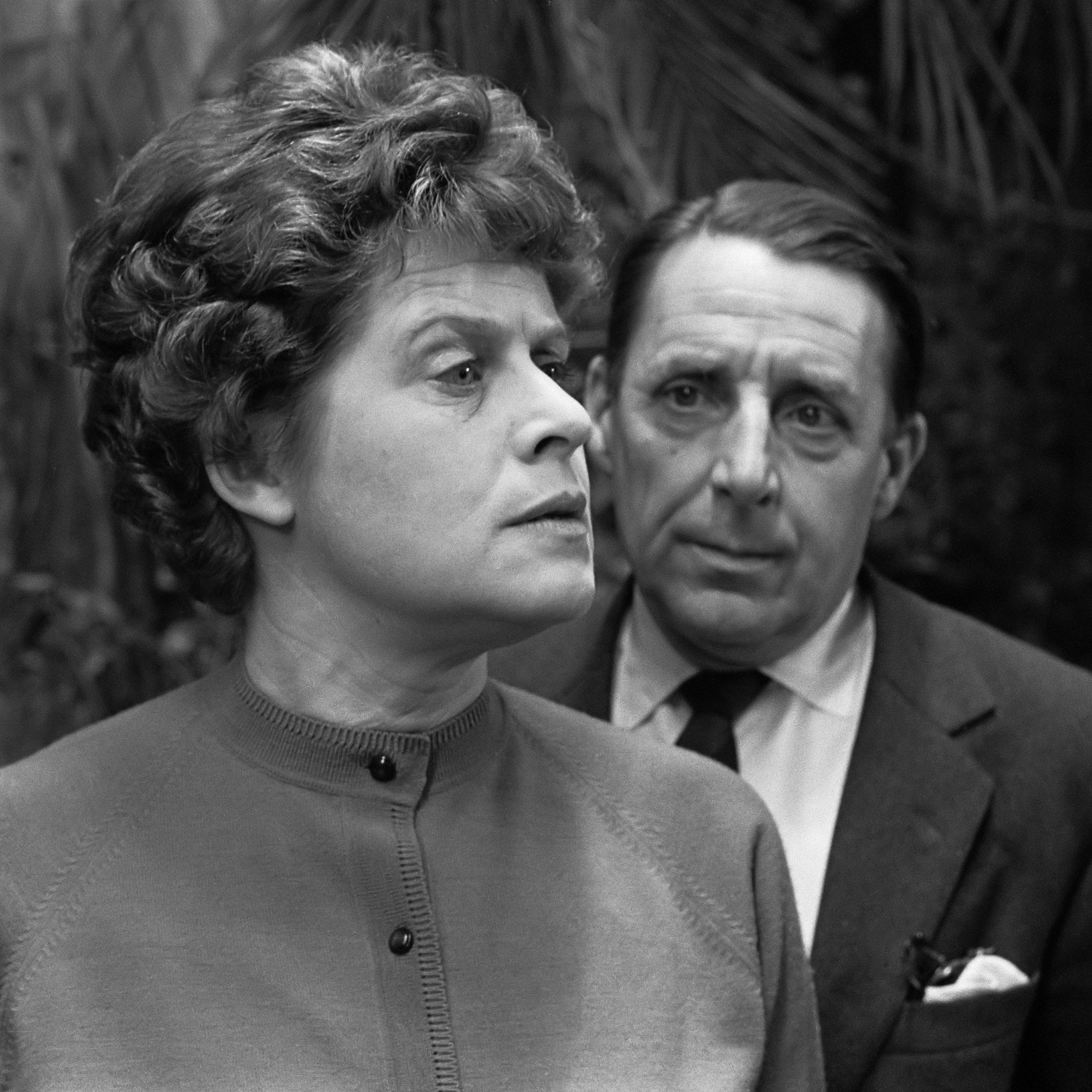 Televisiespel Gevaarlijk Tussenspel. Frans Vorstman, Myra Ward, Hans Tiemeyer 13 december 1961